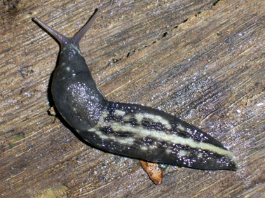 Слизняк великий чорний Limax cinereoniger Wolf, 1803